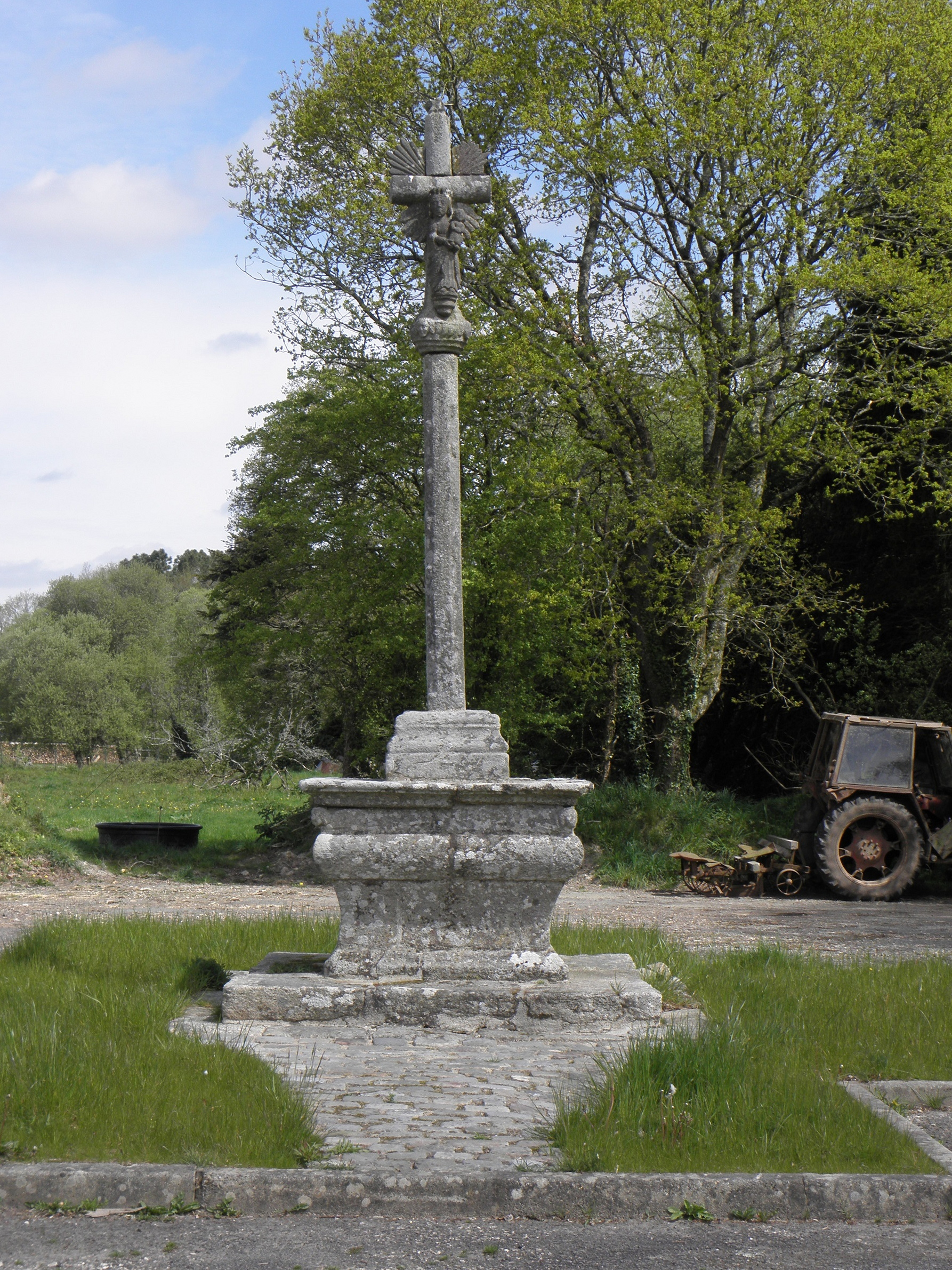 Croix Saint-Yves sise village de Saint-Yves en Bubry (56).